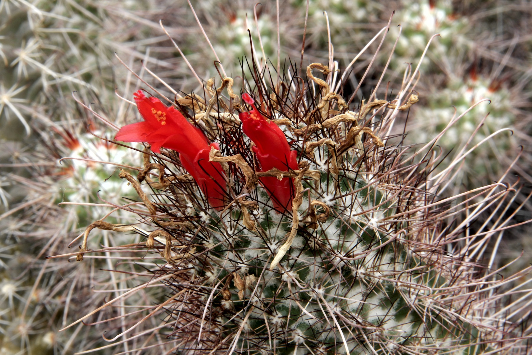 Mammillaria pondii subsp. maritima (Mammillaria maritima)